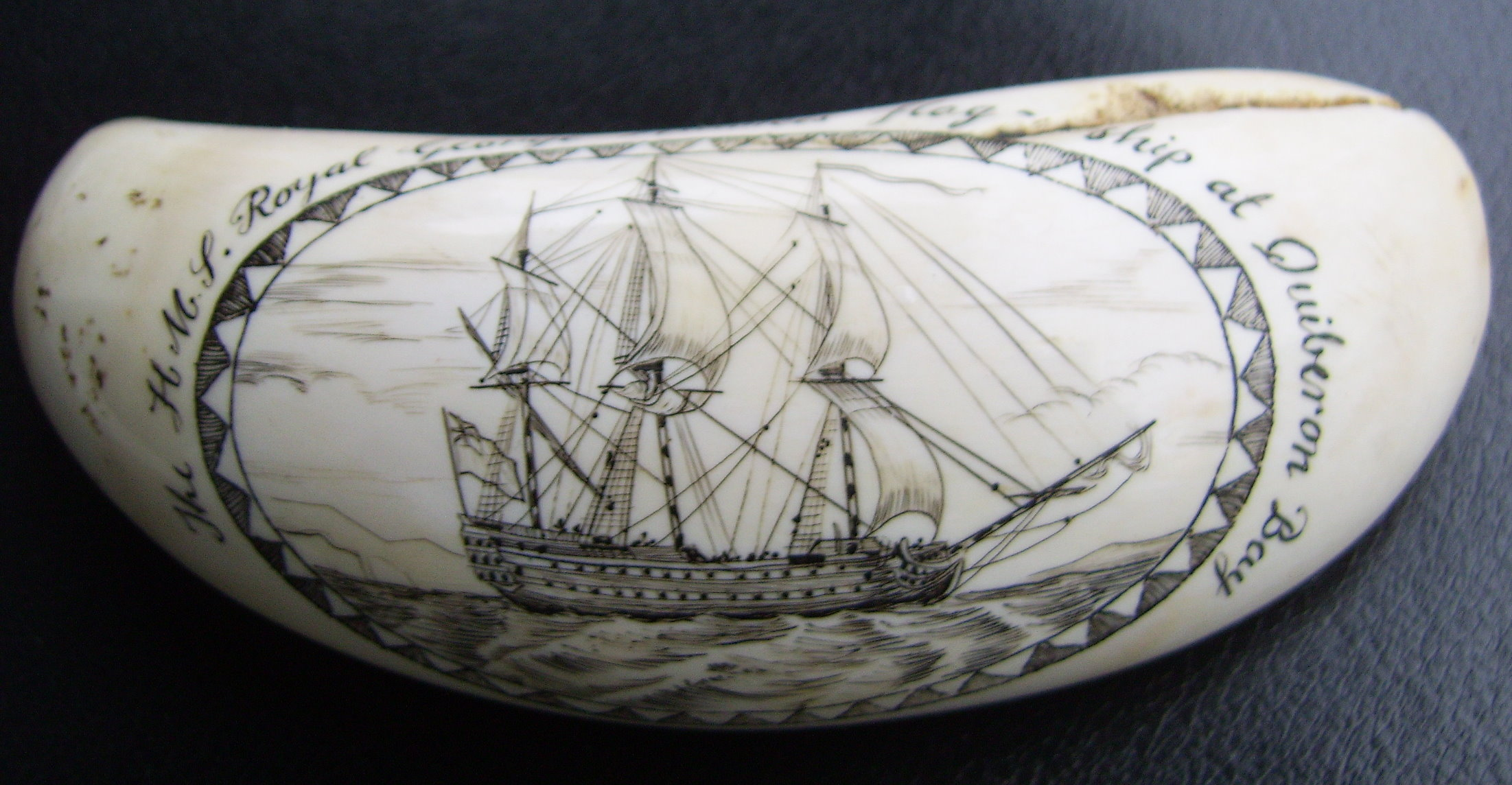 Walzahn, Gravur, HMS Royal George, Commandant Admiral Hawke, Bataille des Cardinaux. Baie de Quiberon 1759